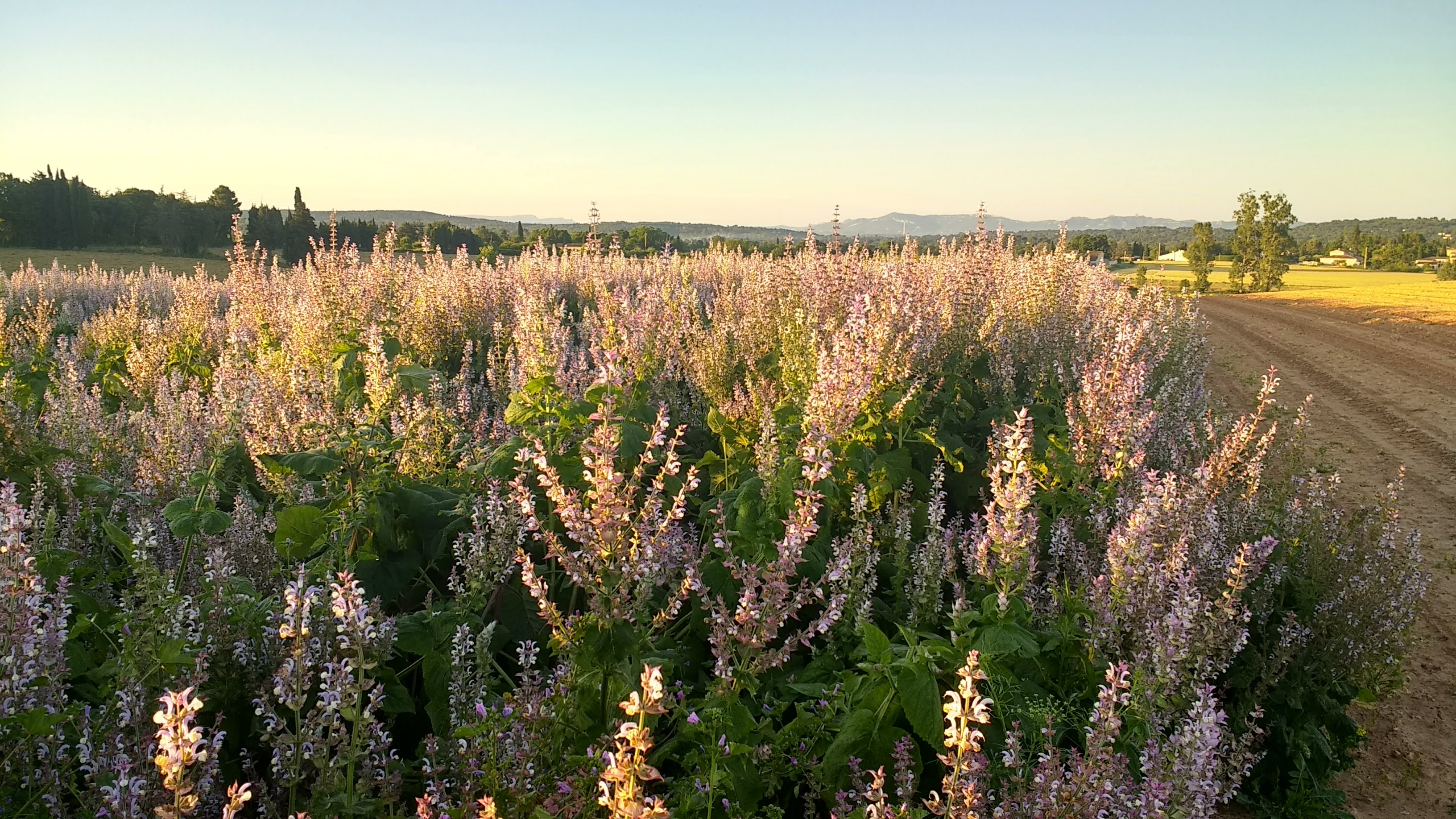 שדה מרווה